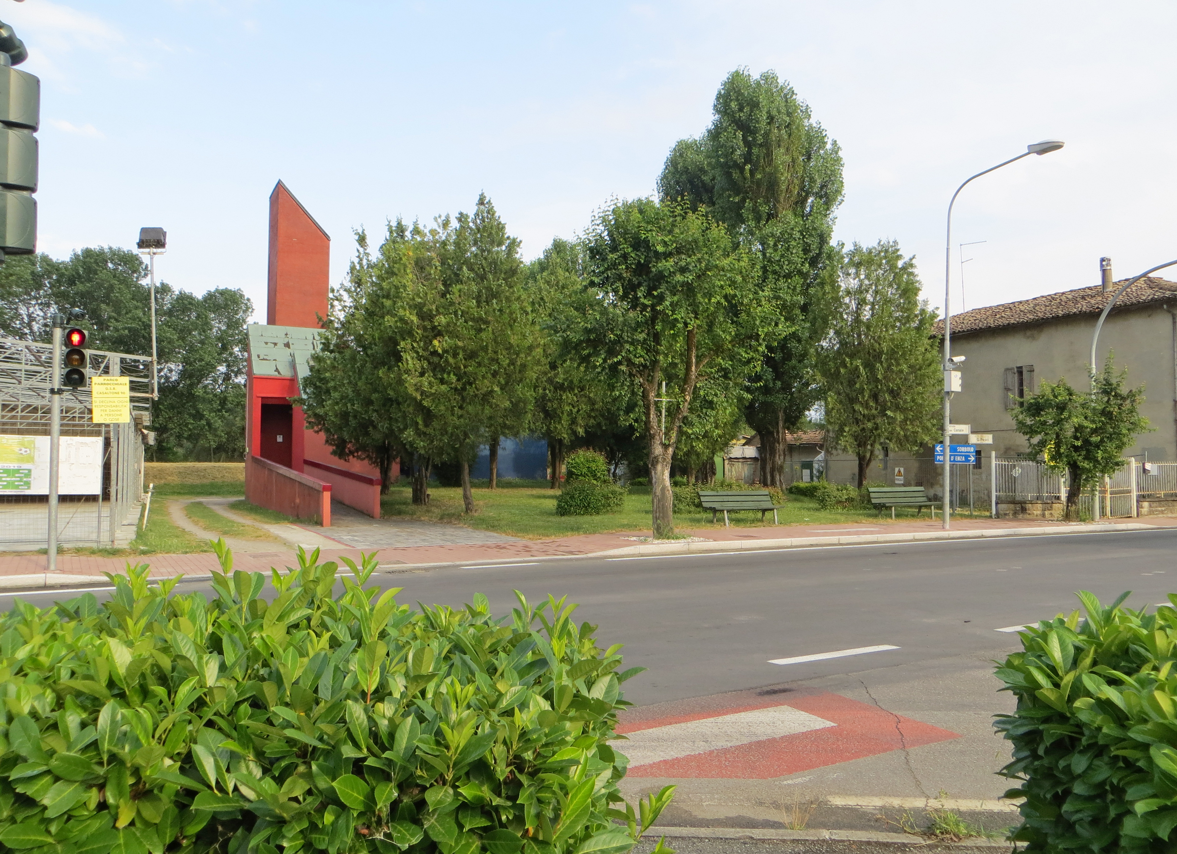 Chiesa della Purificazione di Maria Vergine (Casaltone, Sorbolo Mezzani) - facciata